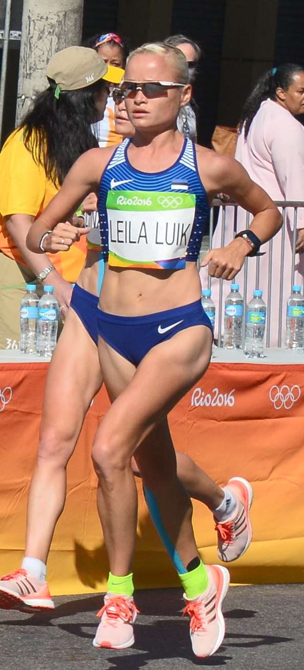 Passage du marathon des jeux olympiques de Rio 2016 dans le centre de Rio